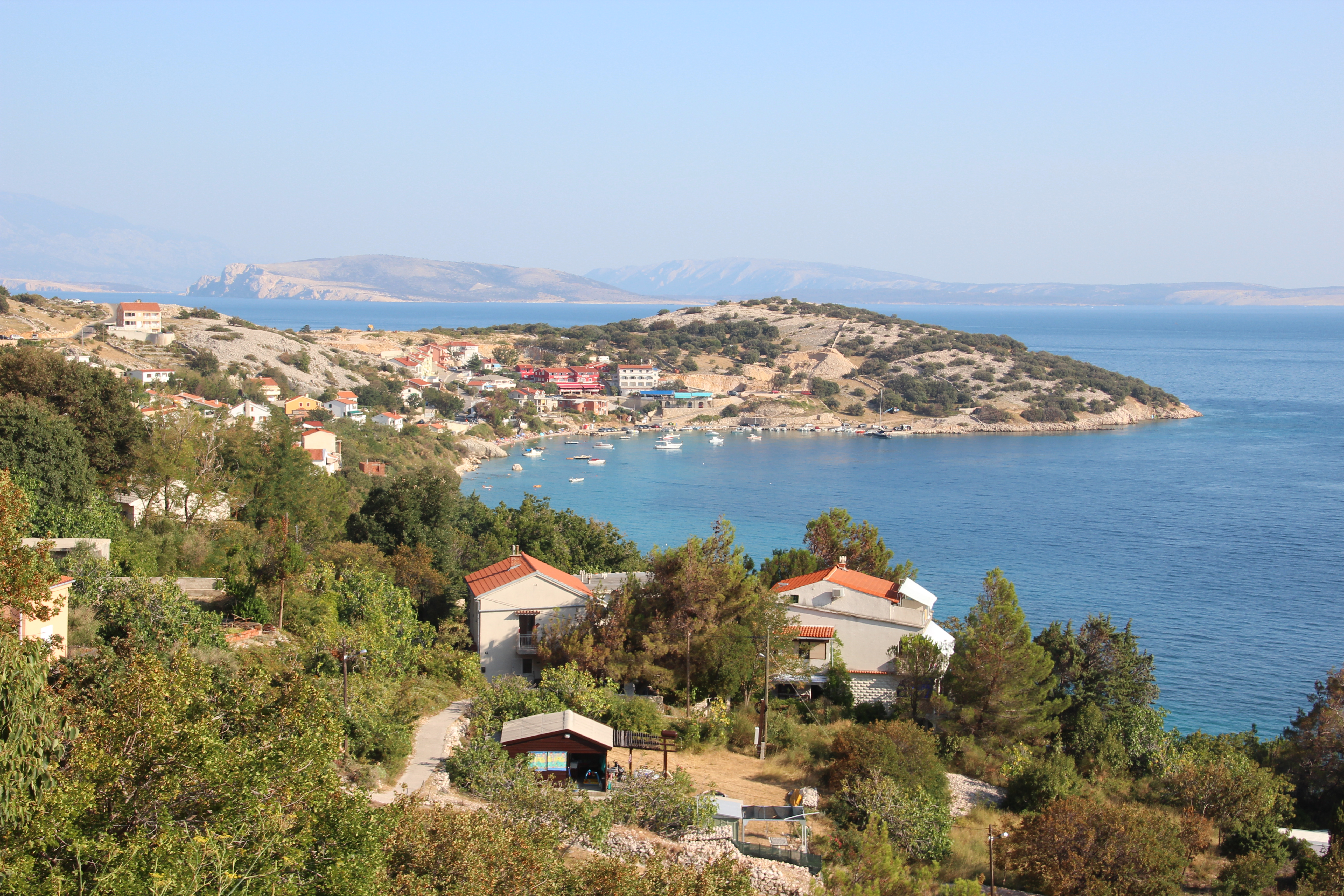 Sicht auf Stara Baska